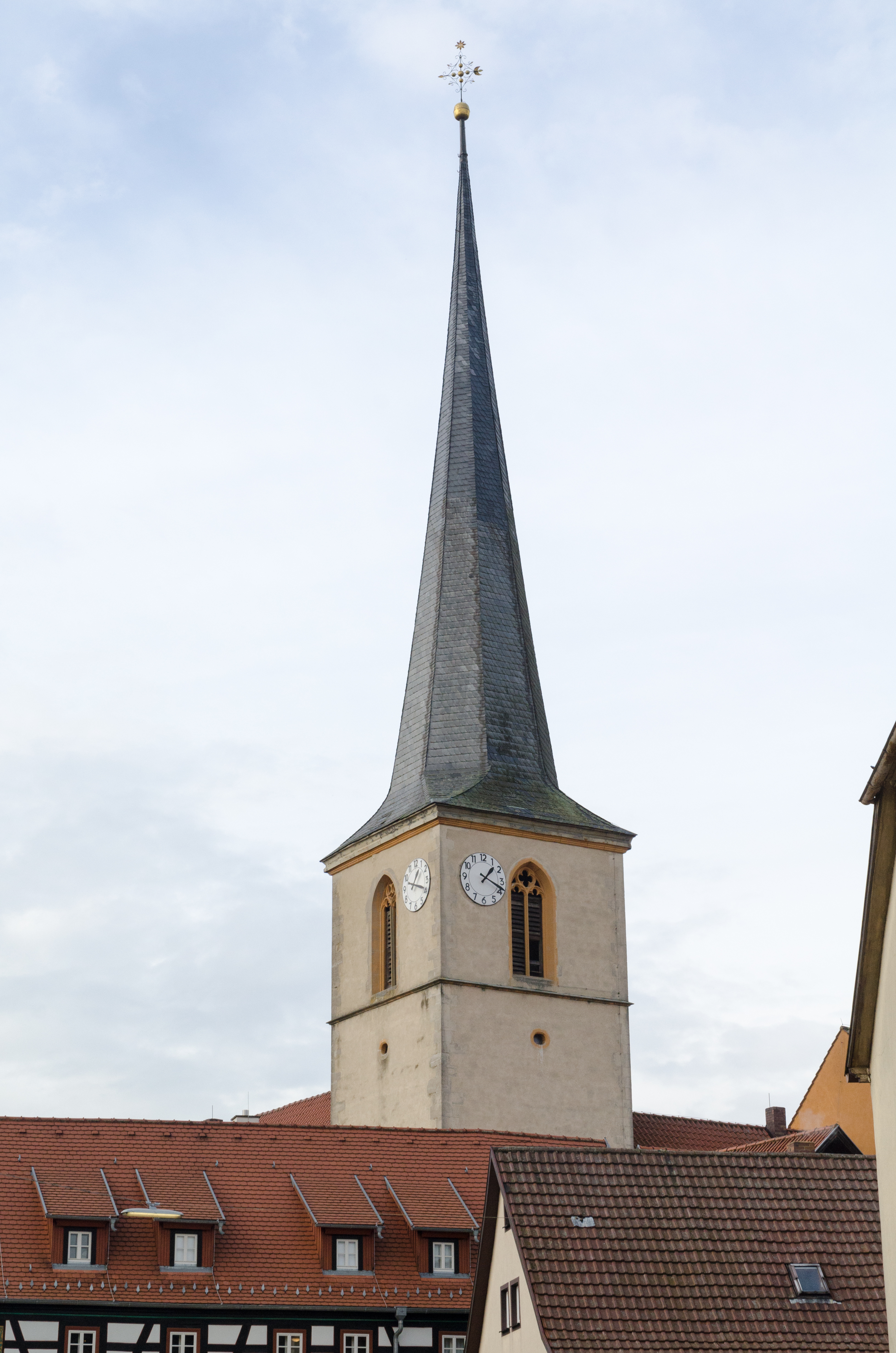 Unsleben, Kirchplatz, alte Kirche